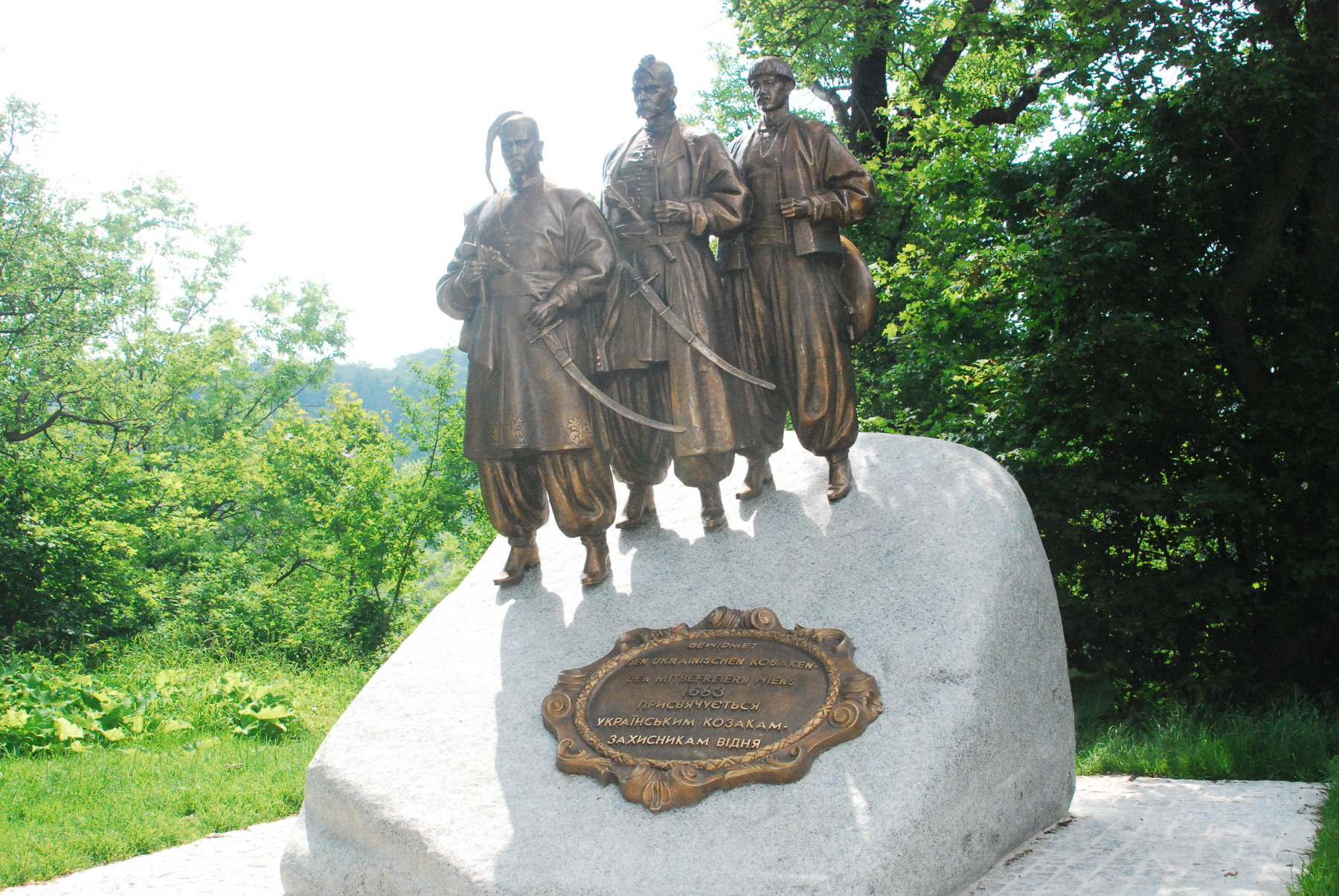 Denkmal für die ukrainischen Kosaken, welche 1683 dem Entsatzheer angehörten